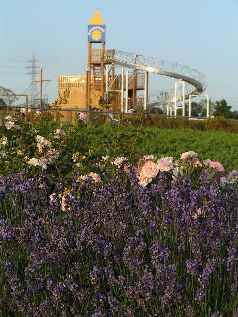 ひまわりの丘公園 ～photo by Autumn Snake 【おぉたむ すねィく探検隊】写真部門 担当 大原佳苗